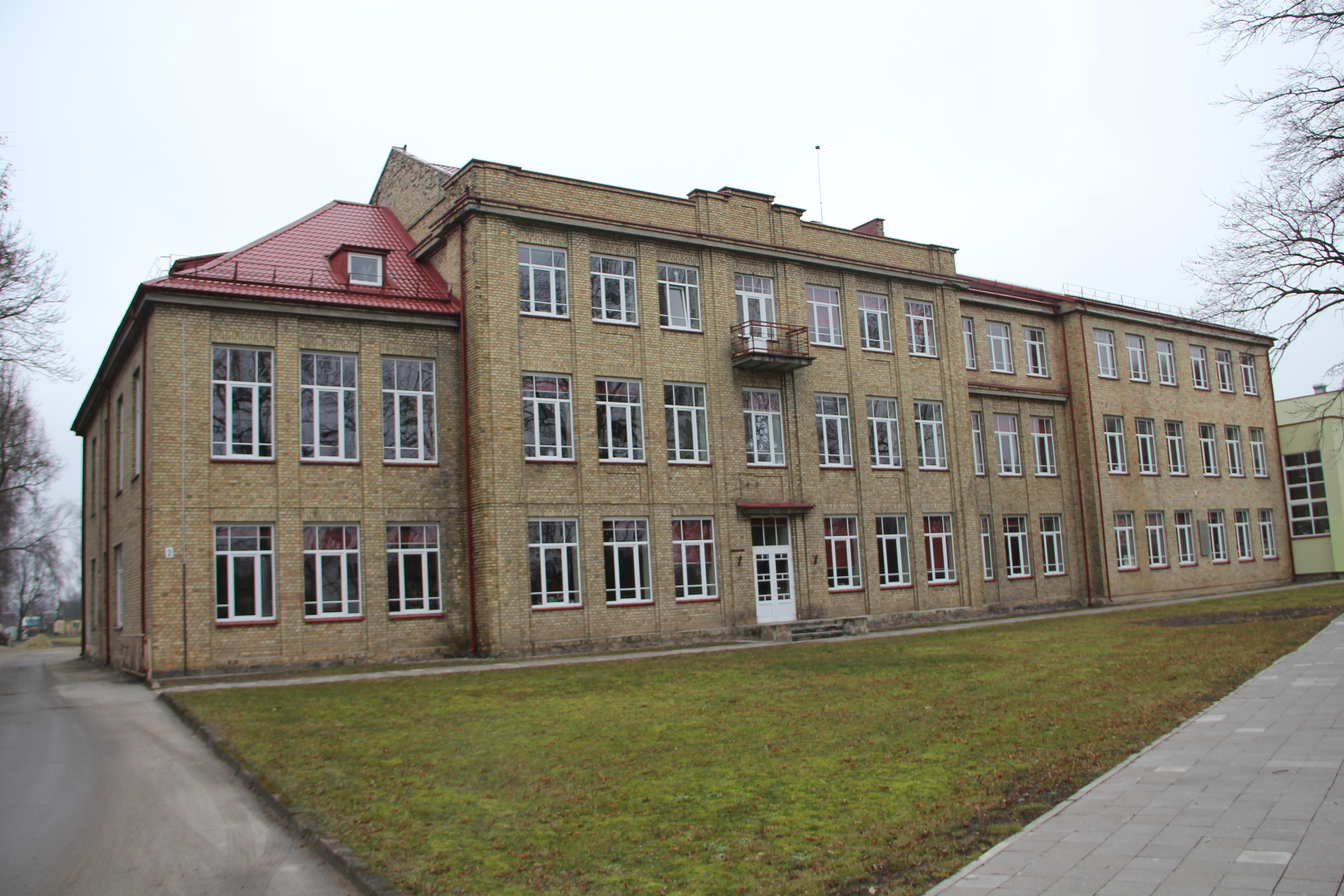 Joniškio gimnazija